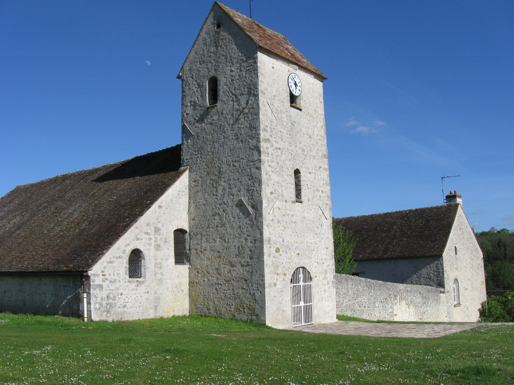 Église Saint-Germain de Poligny (Seine-et-Marne, région Île-de-France)